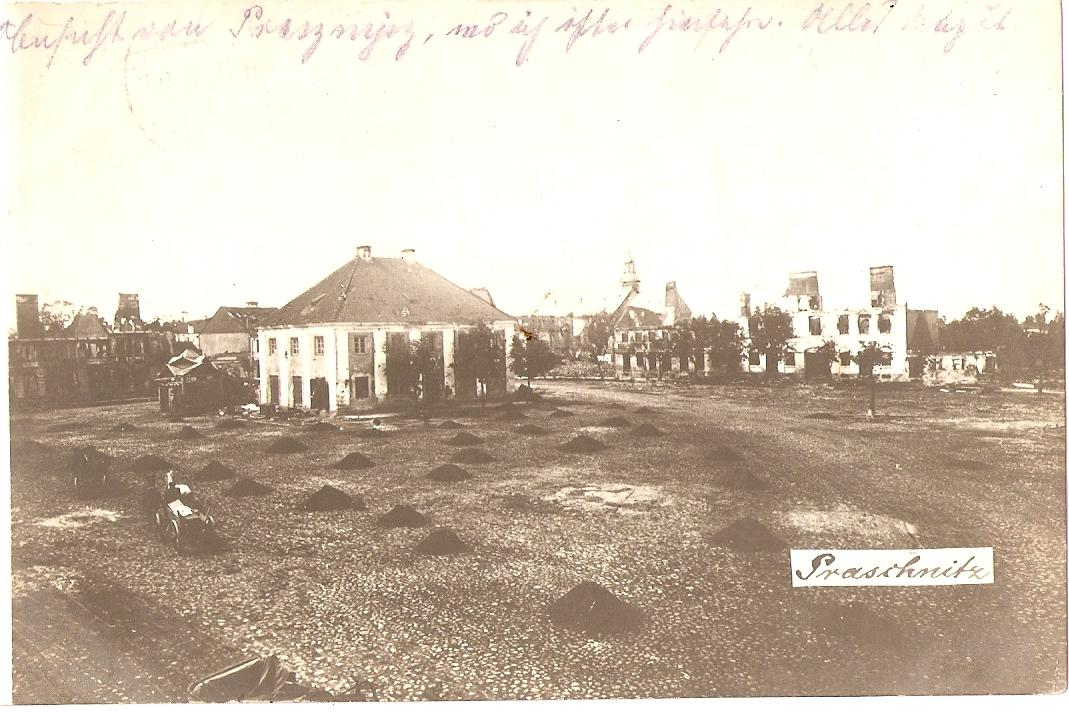 Przasnysz , rynek miejski 1915 rok w tle zniszczone budynki w wyniku działań wojennych